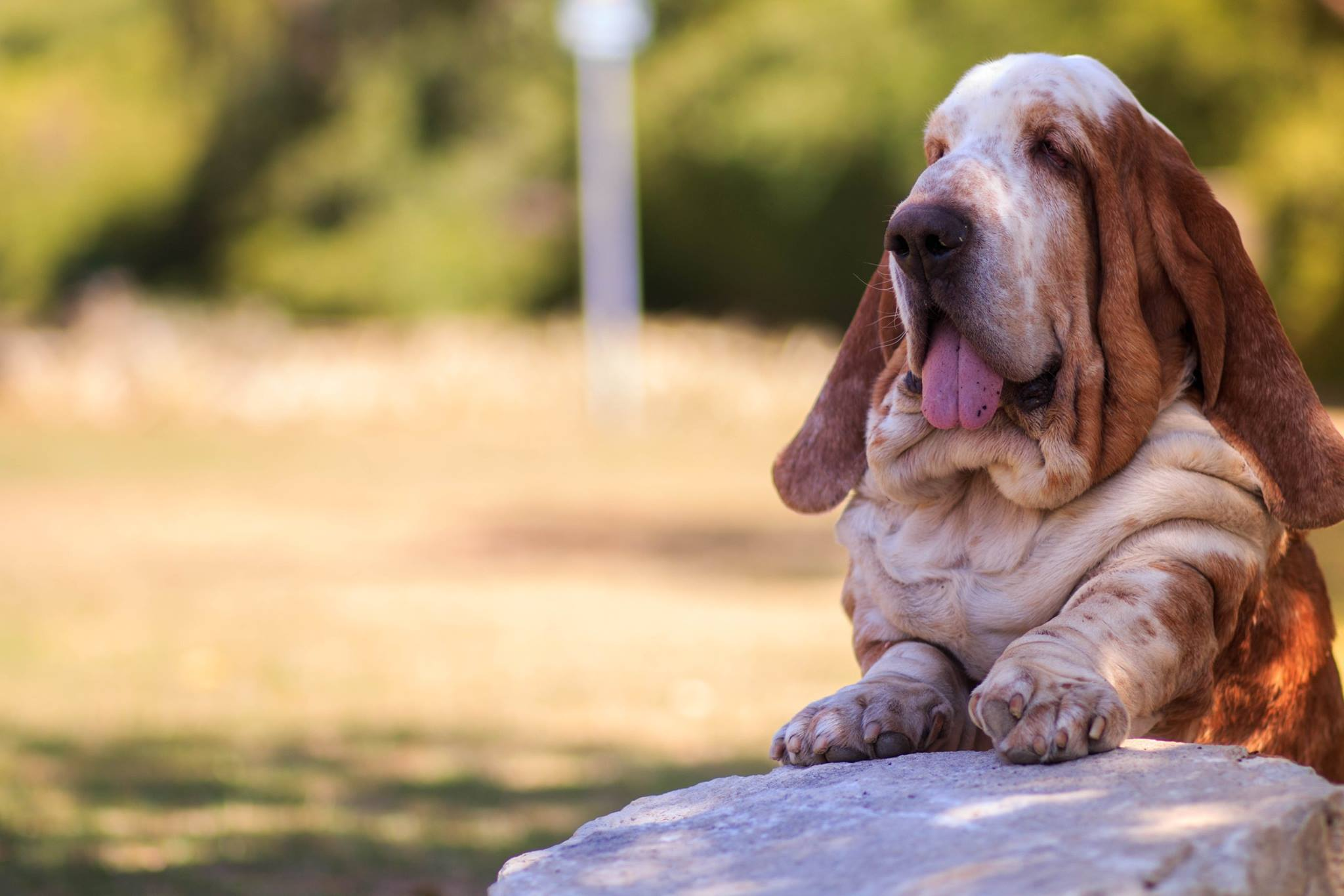 מבנה עור תלוי, שגורם לפנים להיראות עצובות לעתים